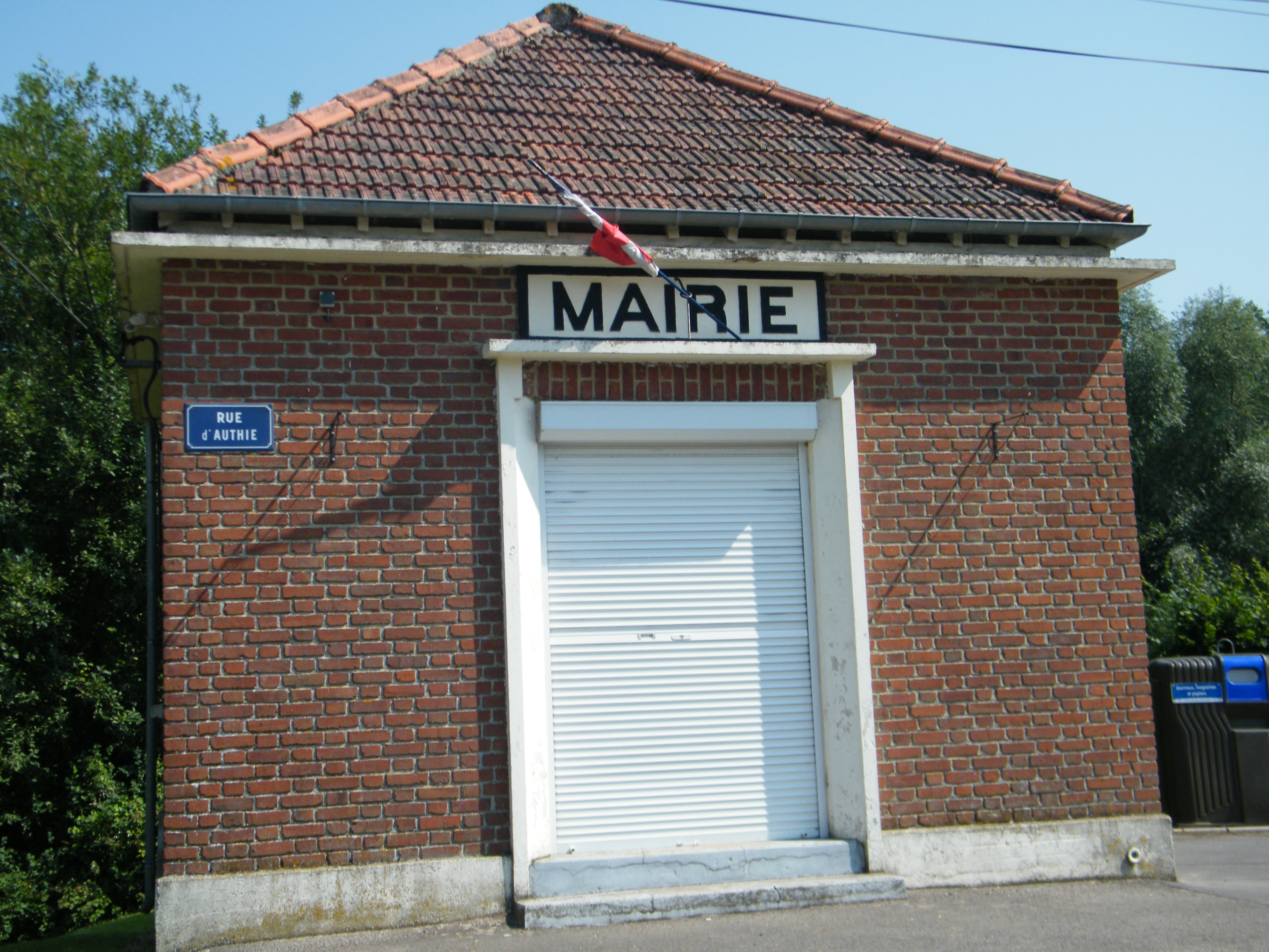 Mairie de Thièvres (Somme).